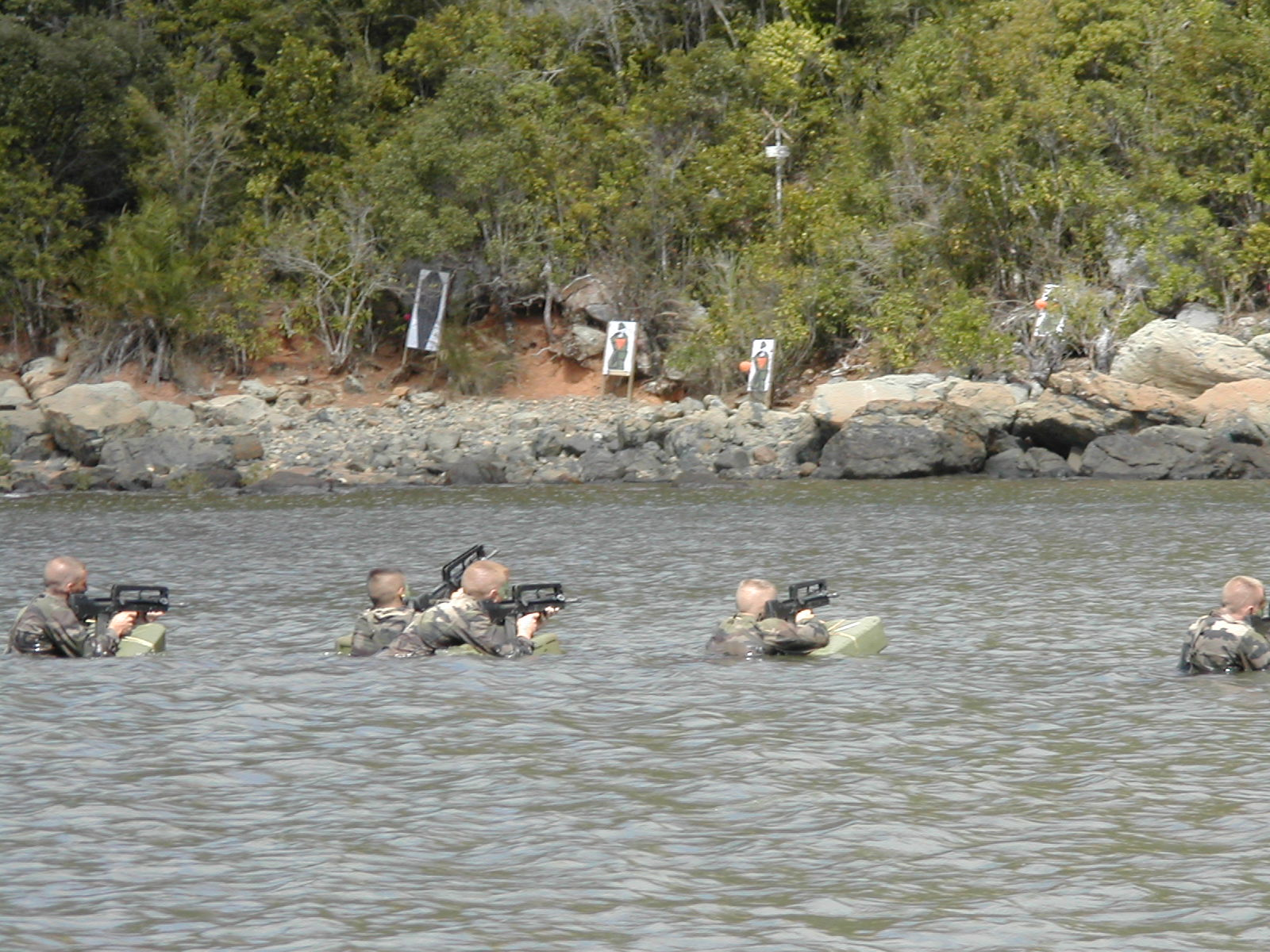 séance de tir depuis la lagune au Détachement de Légion étrangère de Mayotte